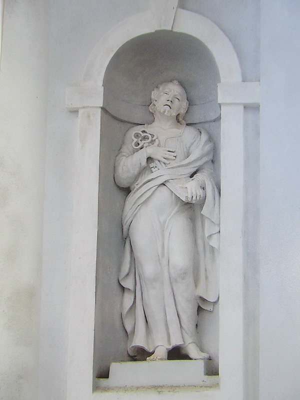 Вярэйкі. Касцёл